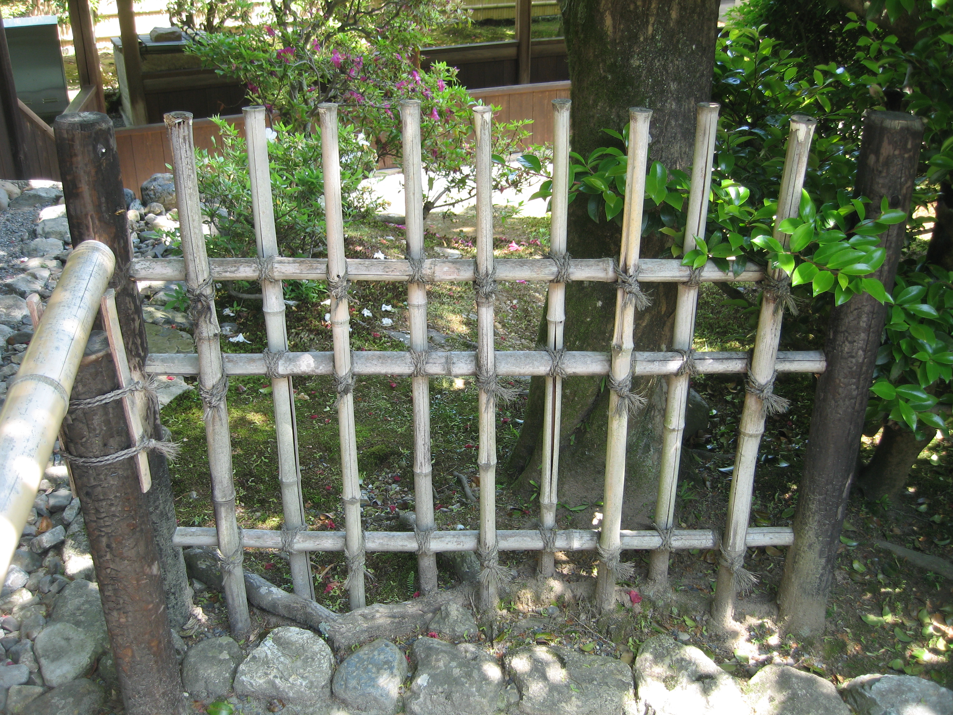 日本の竹垣、四つ目垣